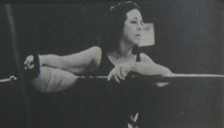 The Fabulous Moolah dans le magazine de catch Wrestling Annual de juin 1975.